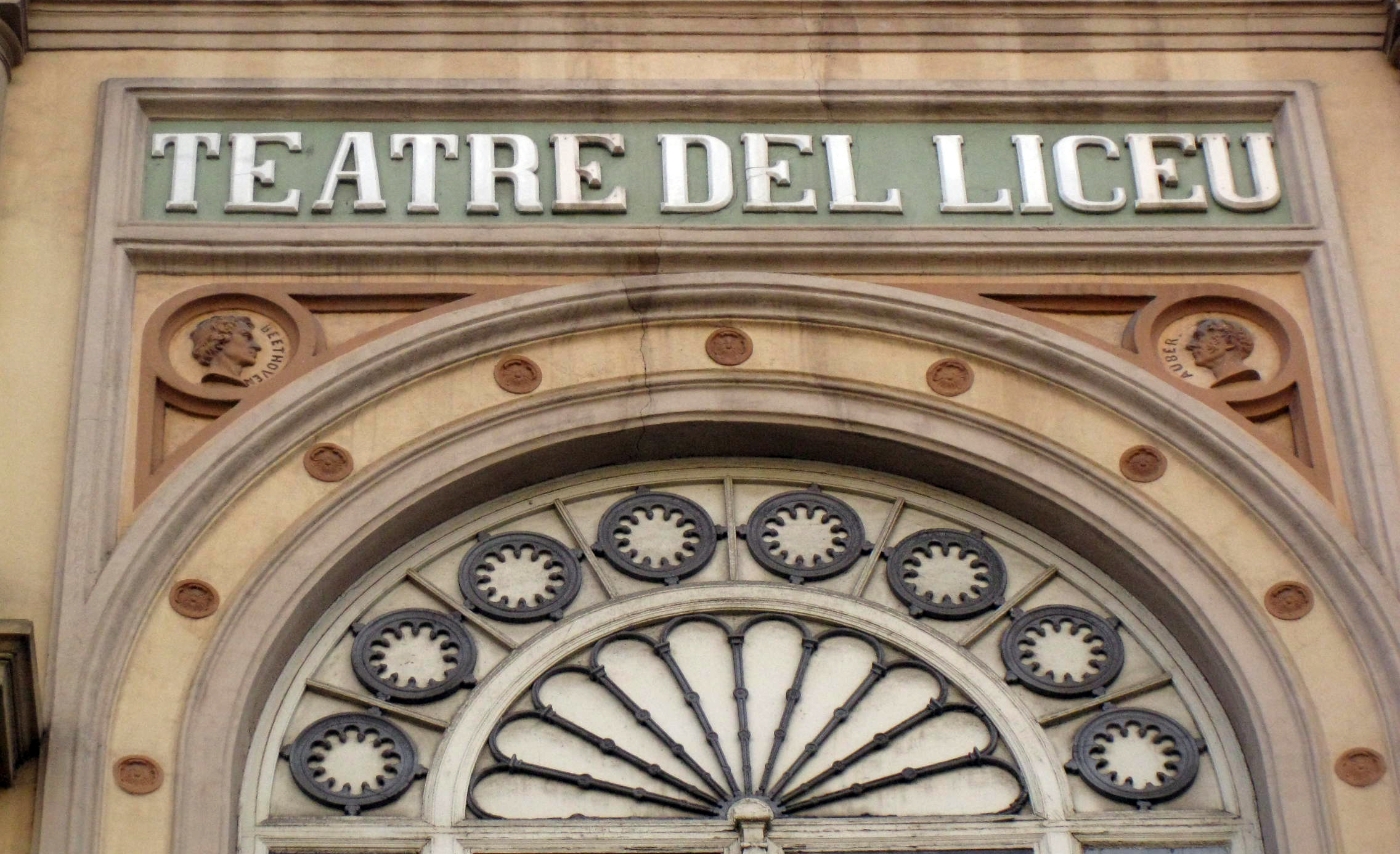 Medallons i bust al Gran Teatre del Liceu. La Rambla, 61-65 (Barcelona)